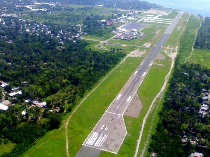 Dili